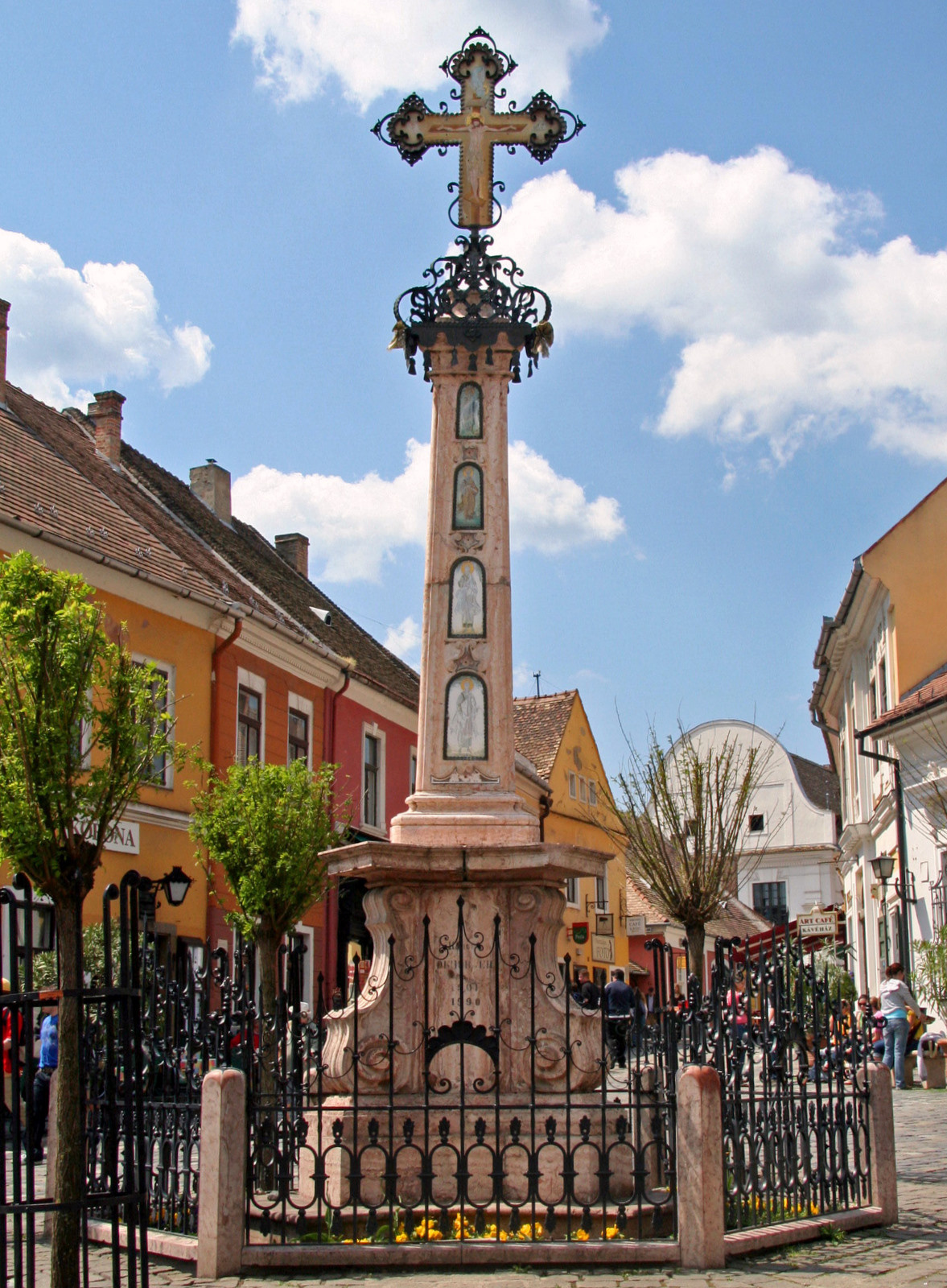 Pestis kereszt (Szentendre, Fő tér)